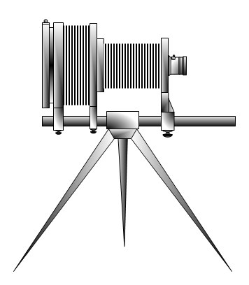 Petzval-féle kettős kihuzatú fényképezőgép